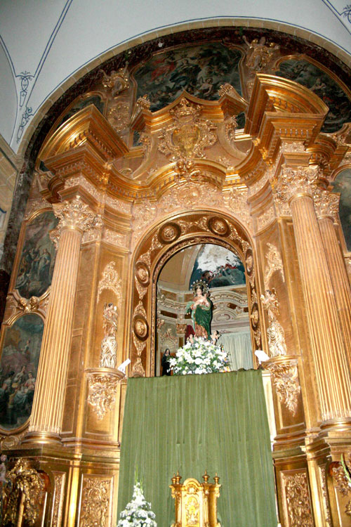 Foto del altar de la Iglesia de Peñas de San Pedro